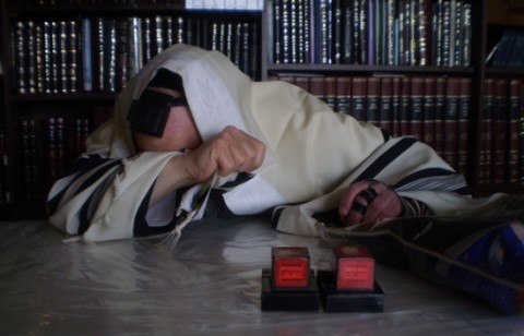 Preghiera ebraica "tachanun" illustrata nella posizione tradizionale reclinata - foto dall'album fotografico di famiglia.